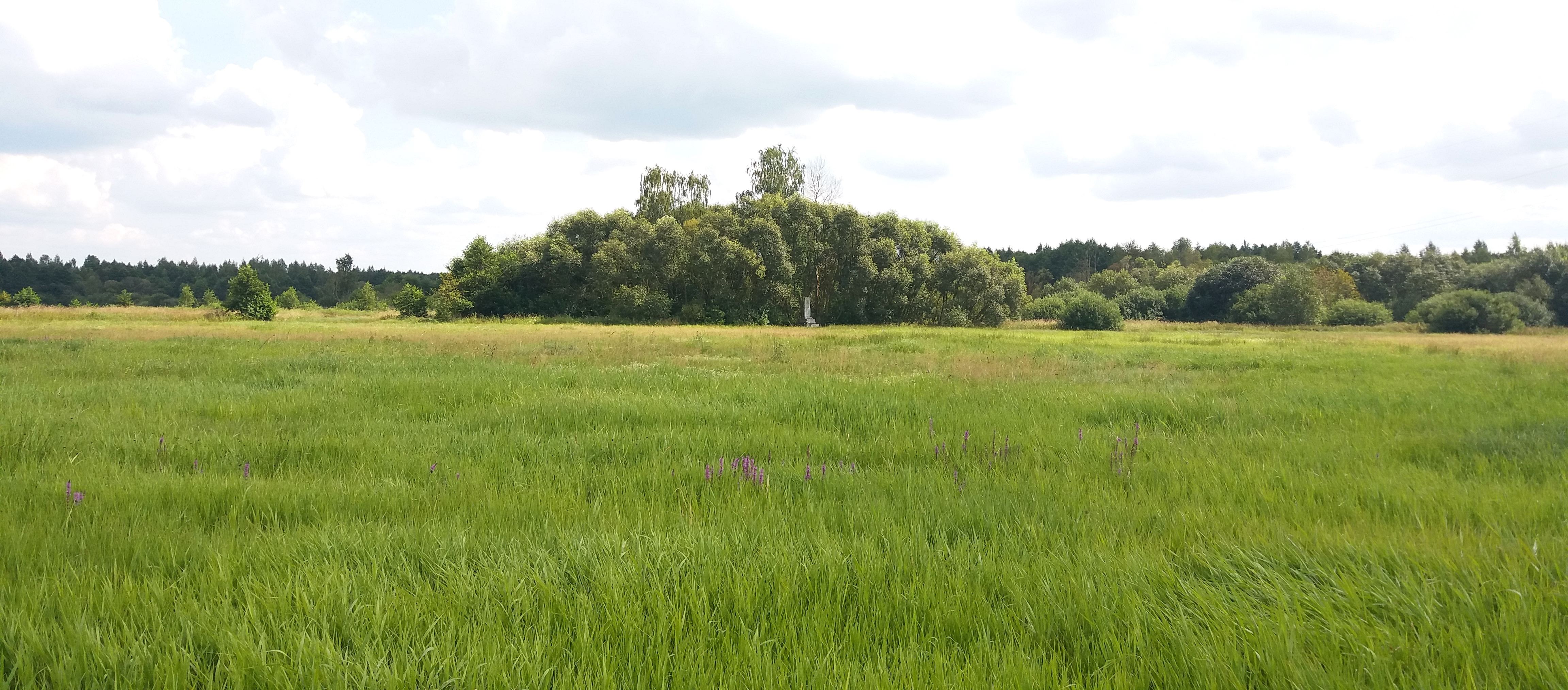 Памятник на месте расстрела евреев местечка Дукора Пуховичского района Минской области в ноябре 1941 года. Находится между рекой Свислочь и дорогой М5. Установлен в 1956 году.